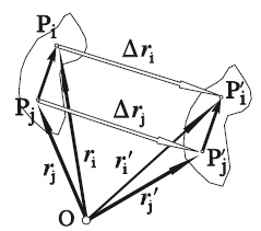 Cinemátiva del Sólido Rígido. Movimiento de traslación